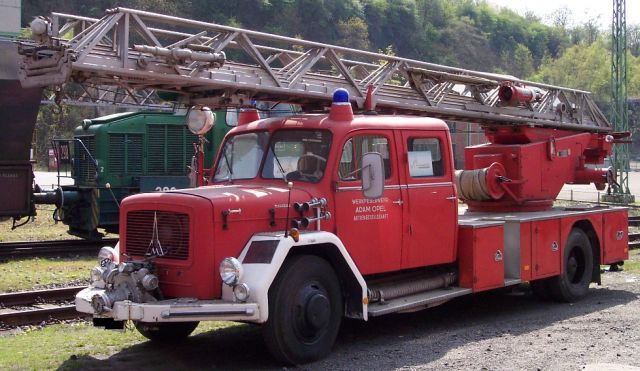 Drehleiterfahrzeug ehemals der Opel Werkfeuerwehr Bochum